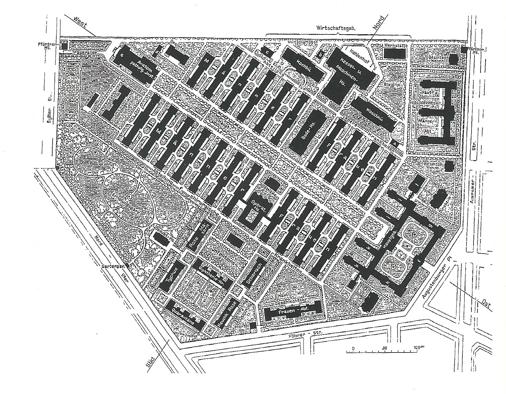 Lageplan des Rudof-Virchow-Krankenhauses 1906